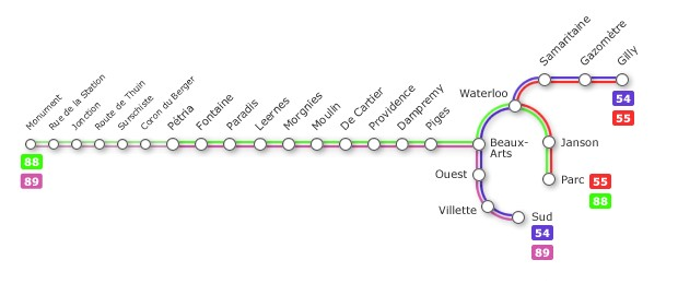 Carte du MLC de charleroi